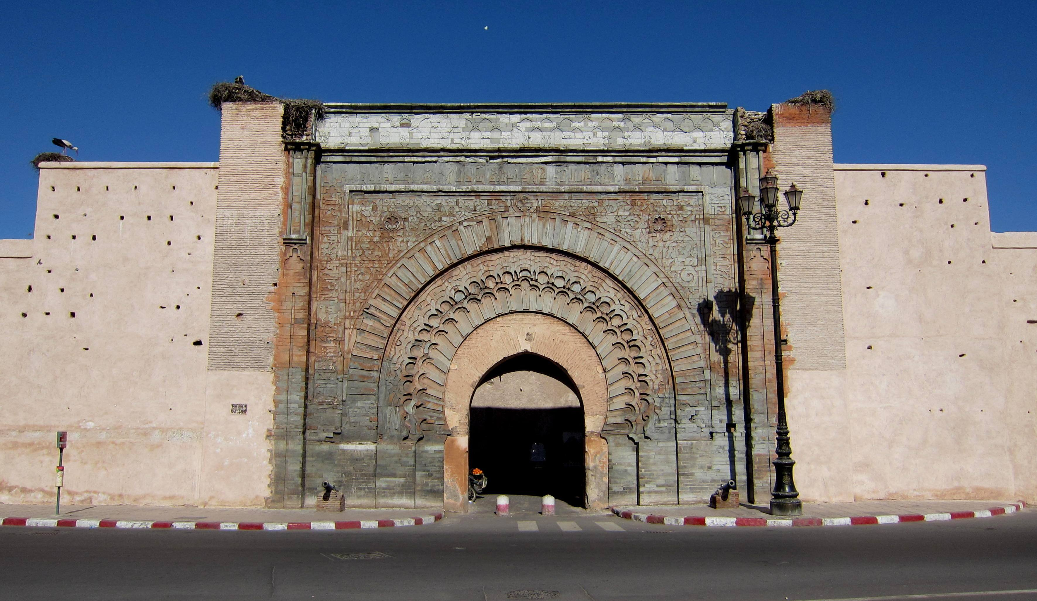 Das Bab Agnaou aus dem Jahr 1190, Marrakesch